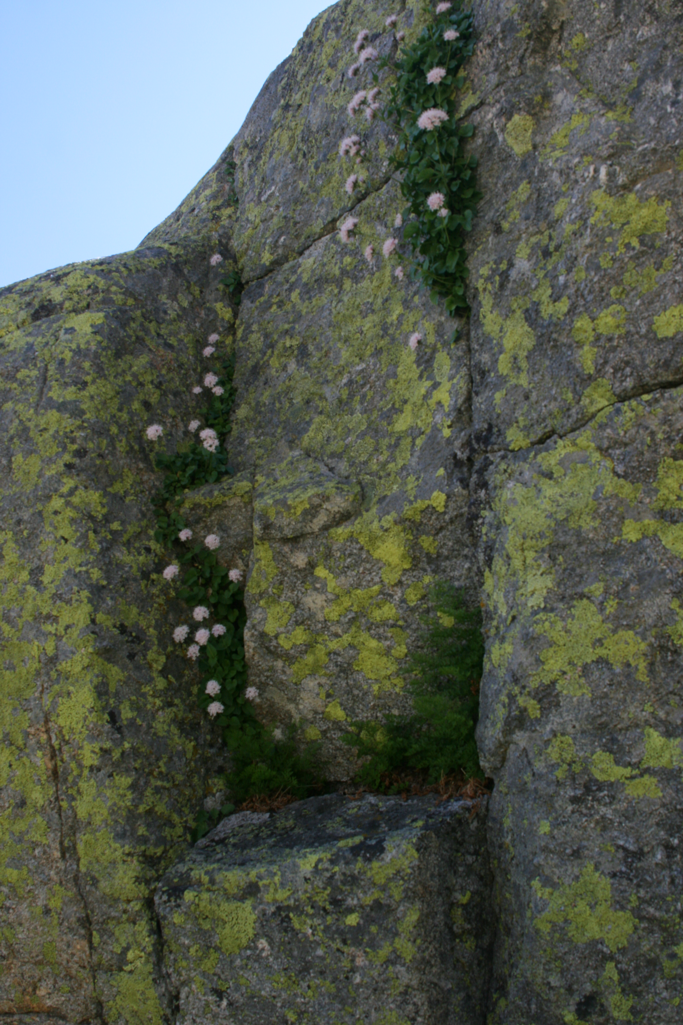 Flora en las inmediaciones de la Laguna Grande del Circo de Gredos en la Sierra de Gredos. España